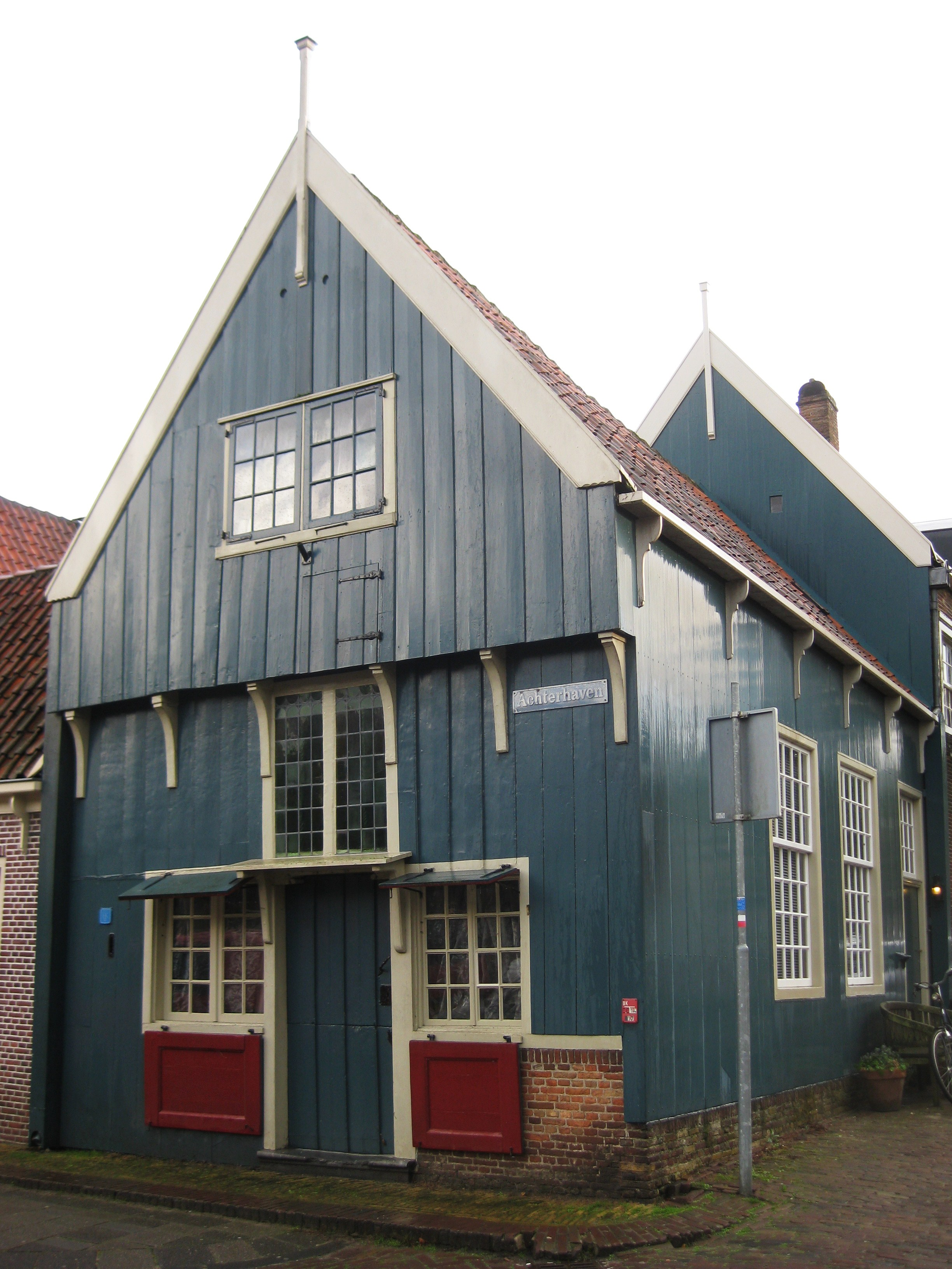 Achterhaven 105, Edam